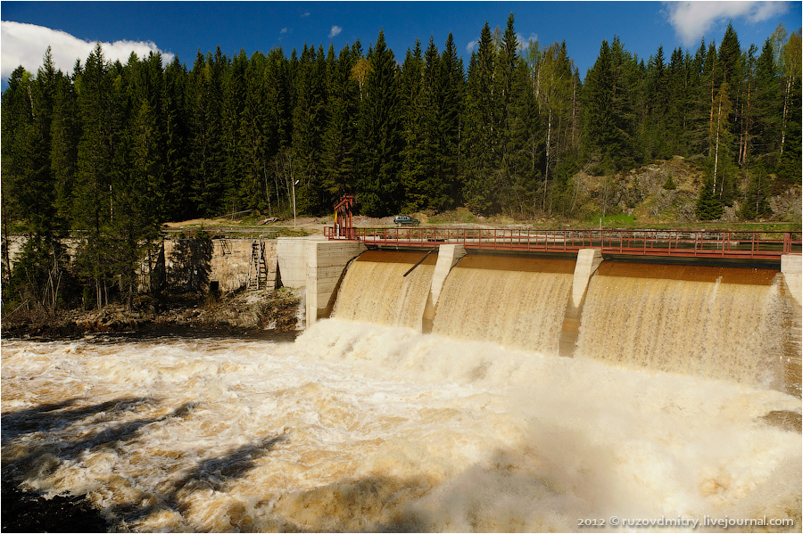 Водосброс на Хямекоски ГЭС-21